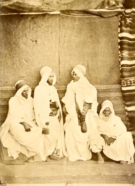 Notables musulmans, Oran, 1856-1857. Si Djelloul Kaïd des Fahallaïts, Kaddour Bou Alem Kaïd des Gharabas, Kaddour Ben Miloud lieutenant de spahis , El Hadj Mohammed ancien Kaïd des Smelas, Oran.